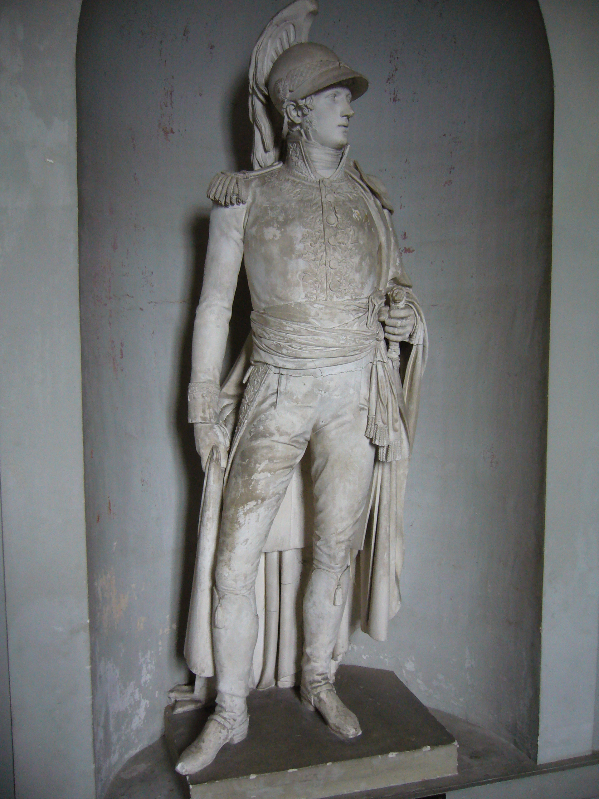 Épreuve en marbre de la statue qui devait être érigée sur le pont de la Concorde